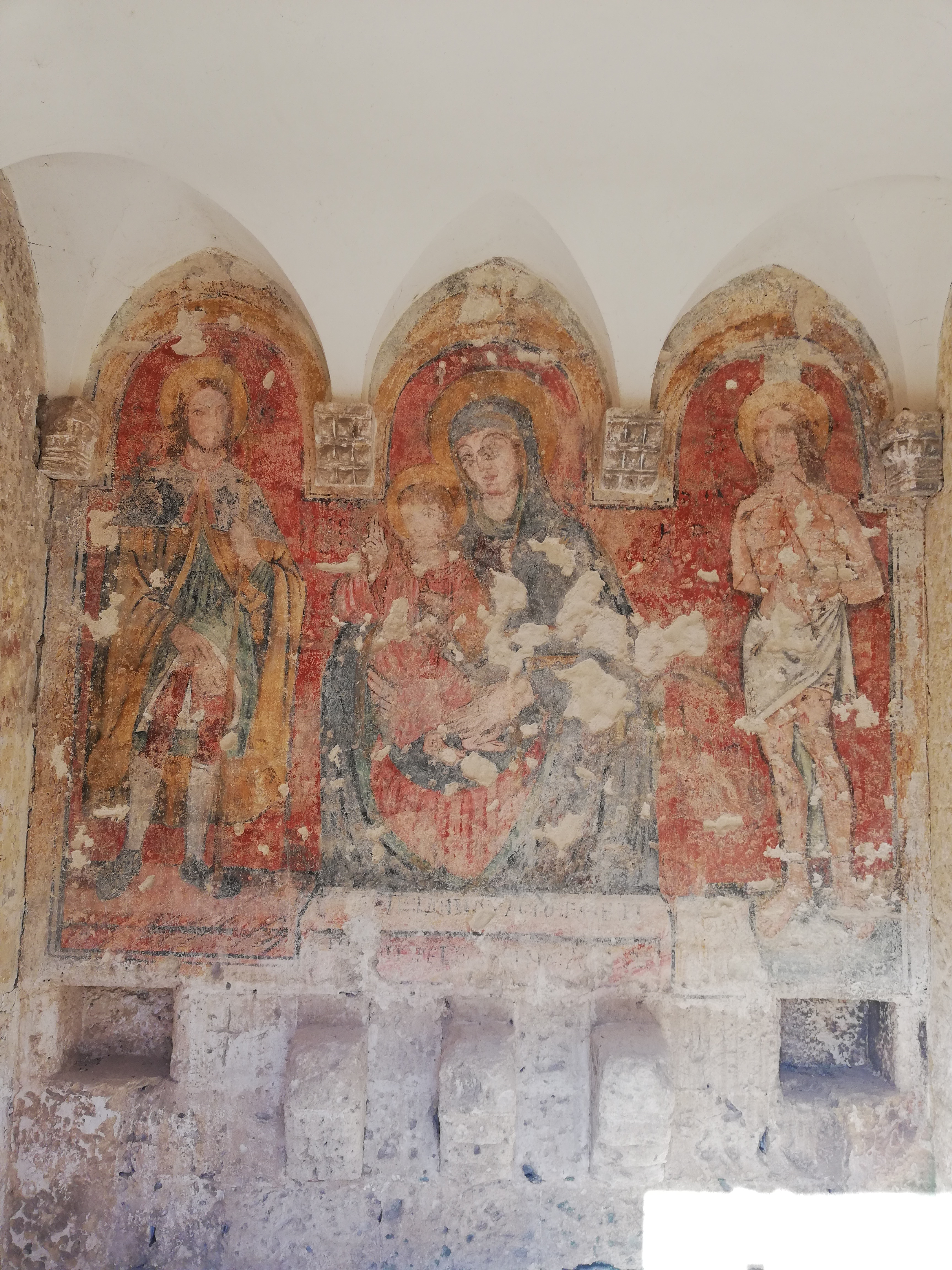 Affresco che ritrae San Rocco, la Madonna con Bambino e Santa Margherita presso la cappella della Madonna di Costantinopoli di Mottola (TA)